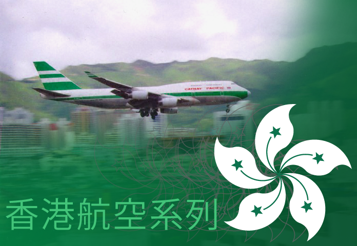 香港航空系列頂圖。參考User:Mcyjerry製作的香港系列模板樣式，由上傳者自行製作。